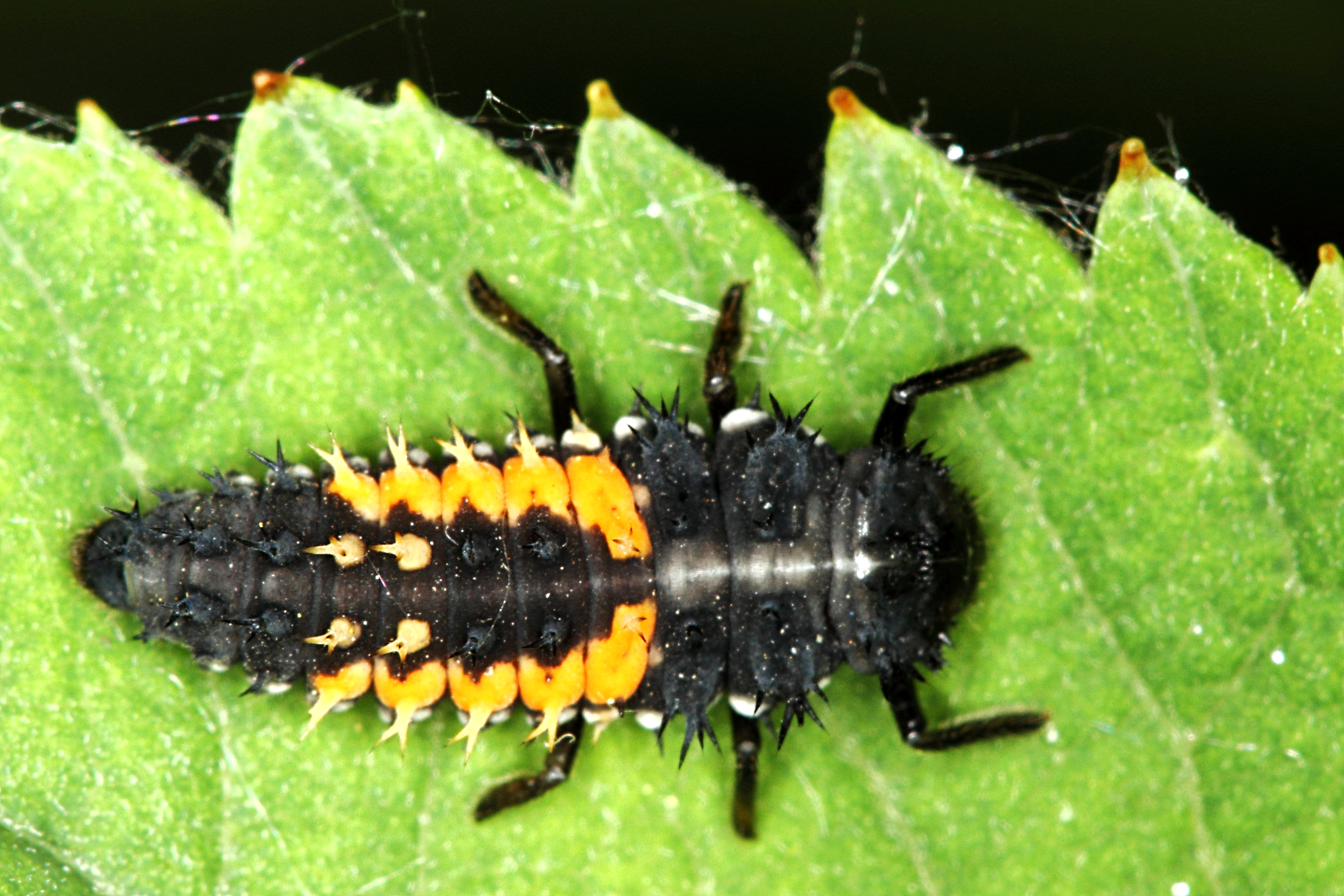 Larve Harmonia axyridis, Sachsen, Laubwald